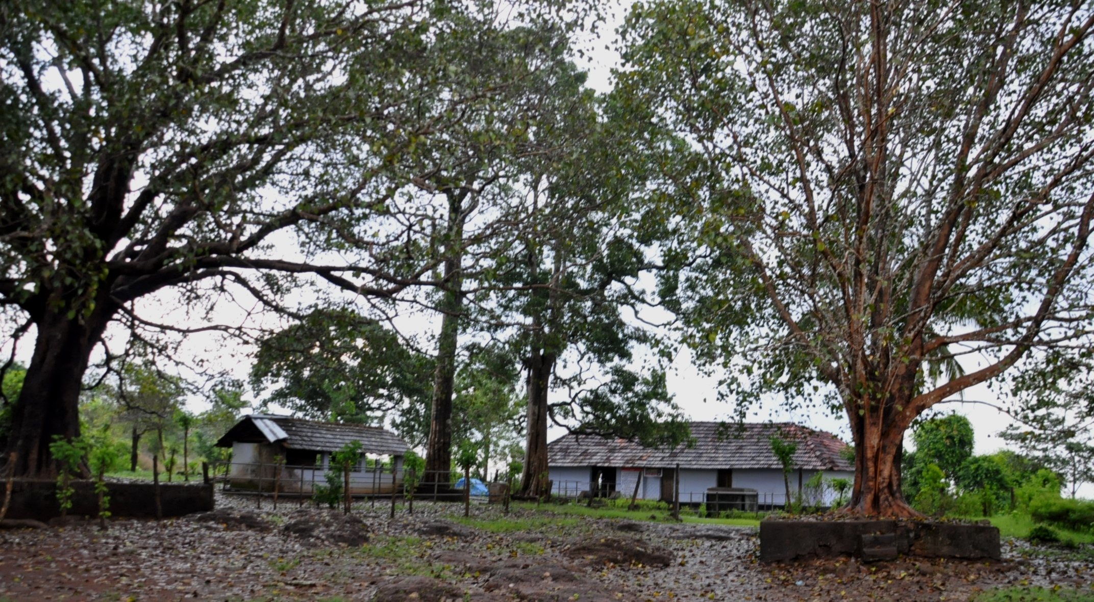 രായിയം കുന്നിലെ നാറാണത്ത് ഭ്രാന്തന്റെ ക്ഷേത്രം